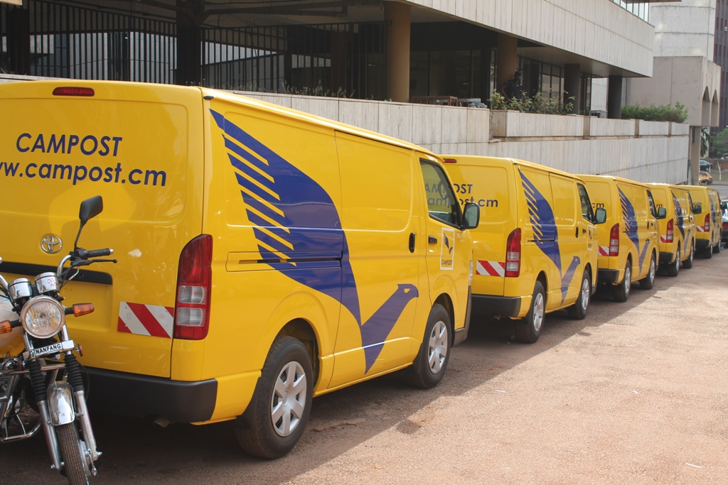 Des vannes Campost en file indienne